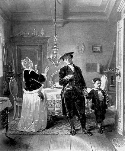 Moritz Daniel Oppenheim Bilder aus dem altjüdischem Familienleben. Frankfurt, 1867